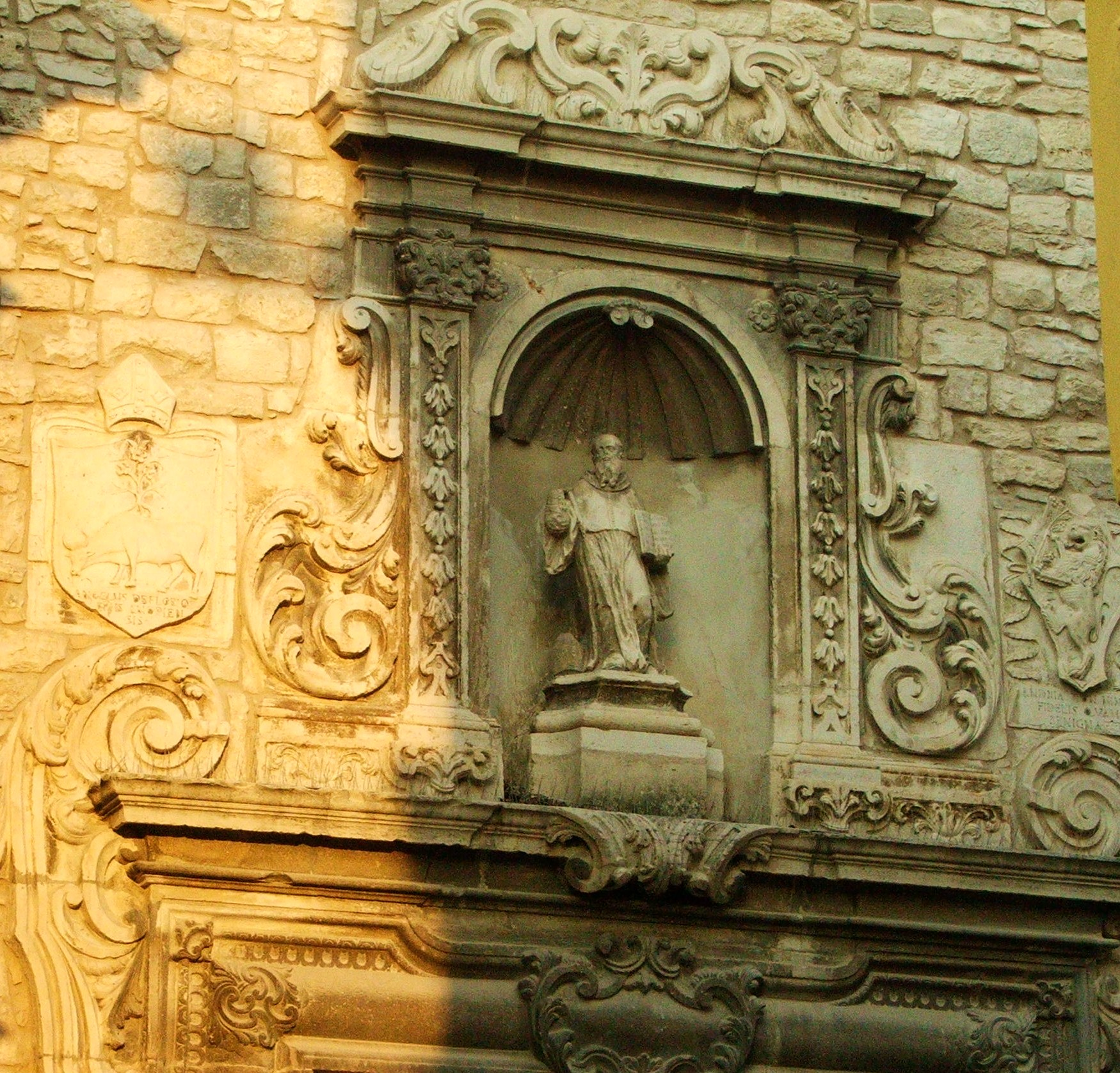 Vecchia entrata del demolito convento delle benedettine, incastonata a lato della cattedrale di Andria